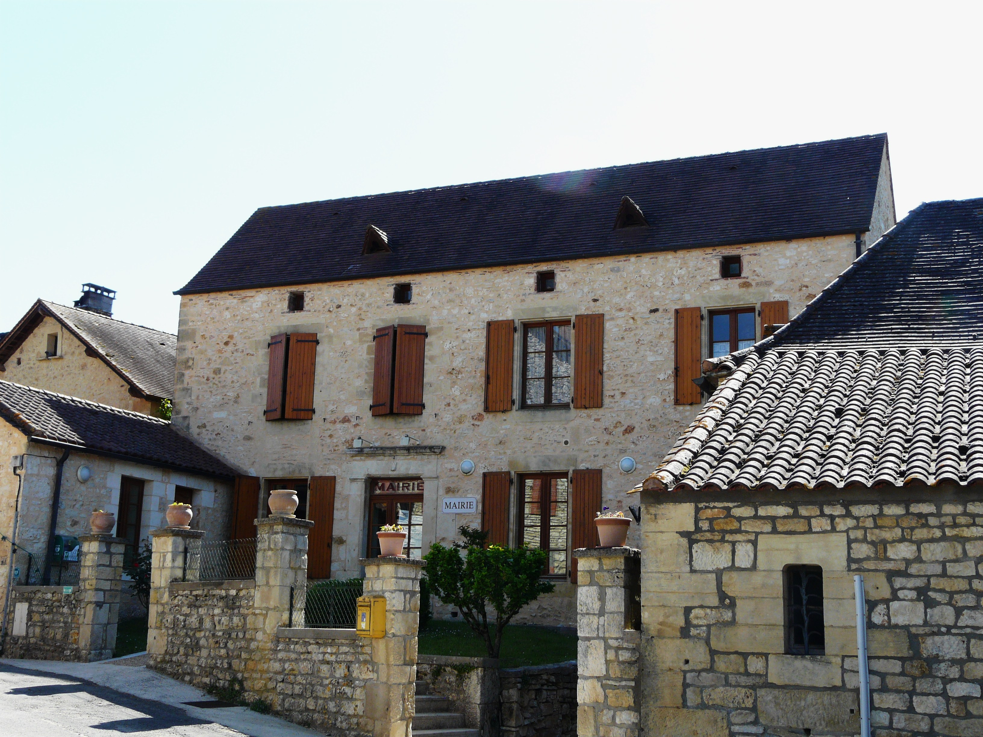 La mairie de Veyrines-de-Domme, Dordogne, France.